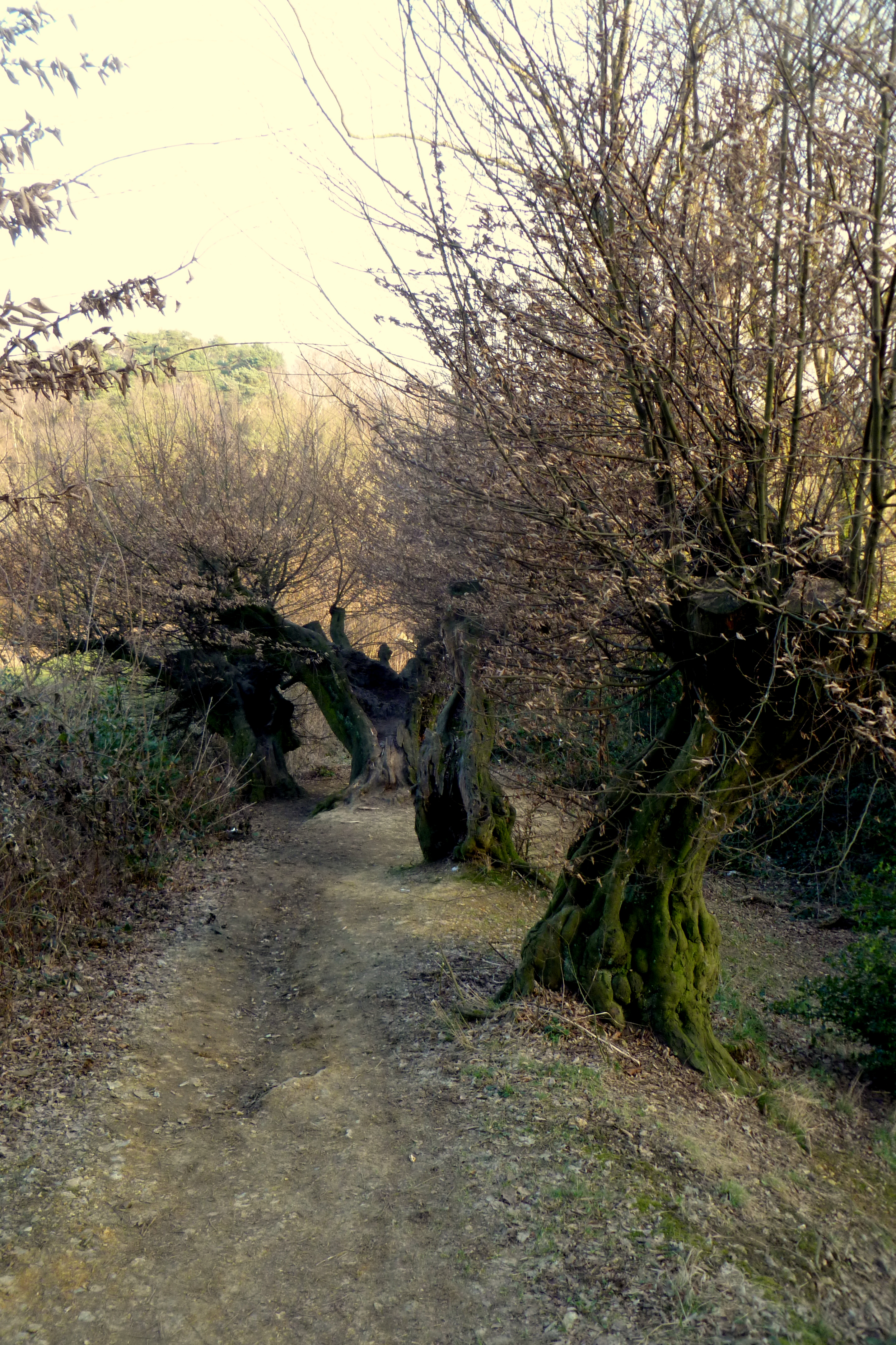 Teil des Inneren Landgrabens in Aachen, Bodendenkmal Phillipionsweg